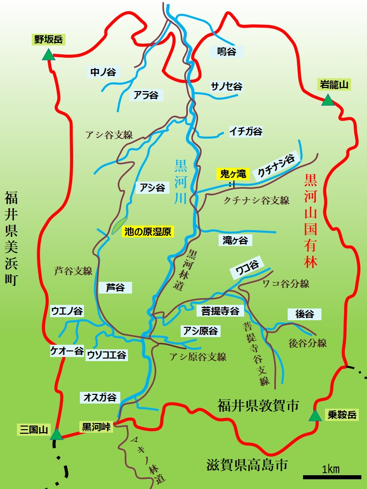 福井県敦賀市の黒河渓谷の地図、黒河山国有林に黒河川が流れ、渓谷を形成している。